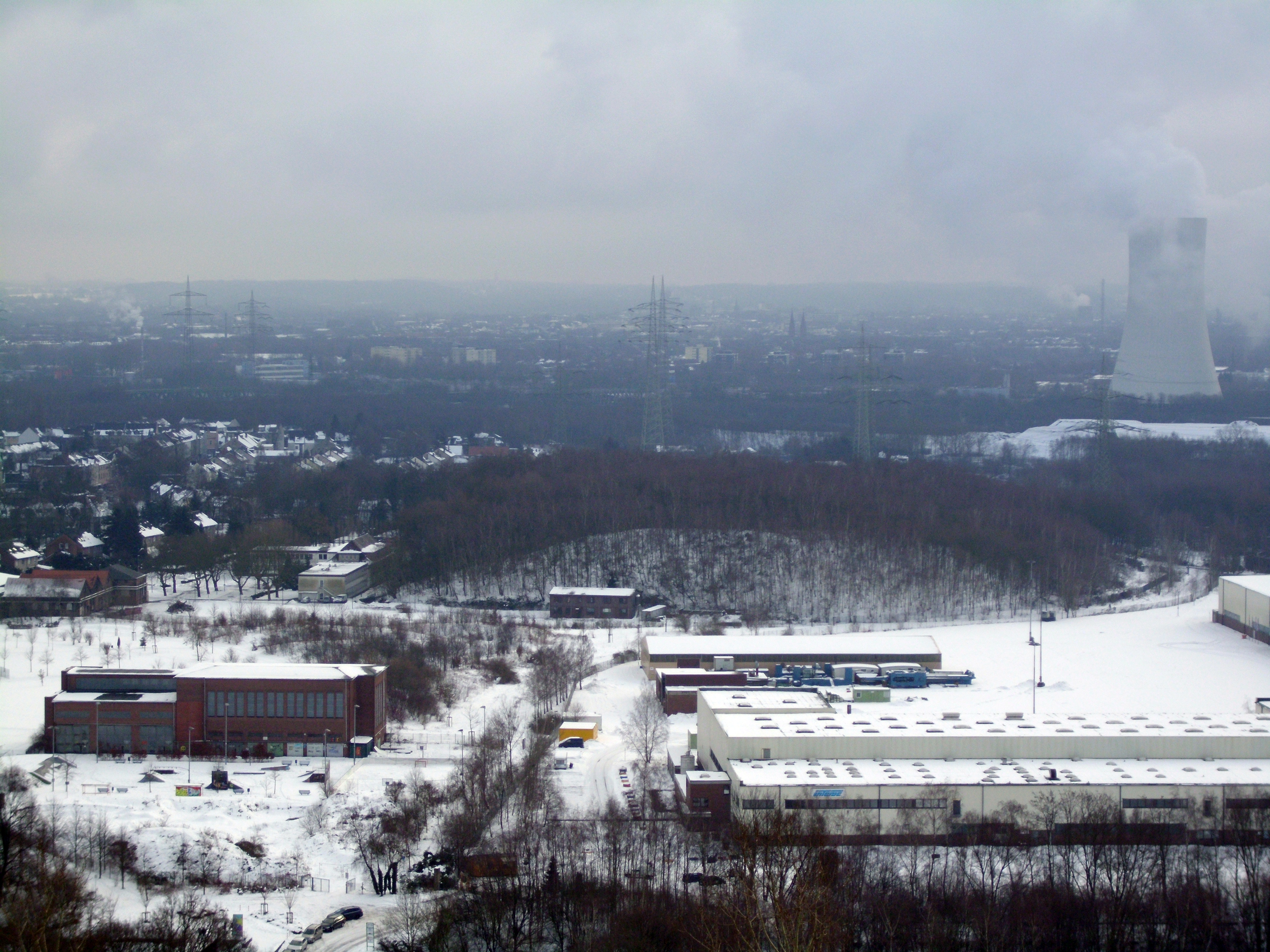 Winterbilder vom Trainingsbergwerk der RAG in Recklinghausen: links neben der bewaldeten Kuppe befindet sich das Hauptgebäude, in der Kuppe die Stollen. Vorne links steht ein Gebäude der Zeche Recklinghausen II und hinten links ein Kühlturm des Kraftwerks Herne Baukau.